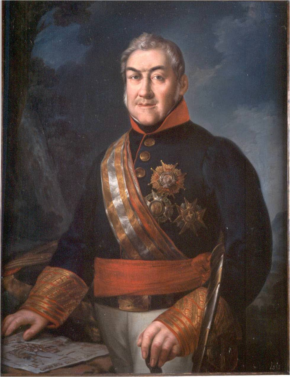 Retrato del militar español José María Santocildes (1771-1847), que llegó a ser teniente general del ejército español y Jefe del Estado Mayor General del Ejército de la Derecha. Además entre 1832 y 1833 llegó a ser capitán general de los reinos de Valencia y de Murcia, y en el retrato aparece vistiendo el uniforme de general y luciendo, entre otras, la banda y la placa de la Orden de Isabel la Católica.